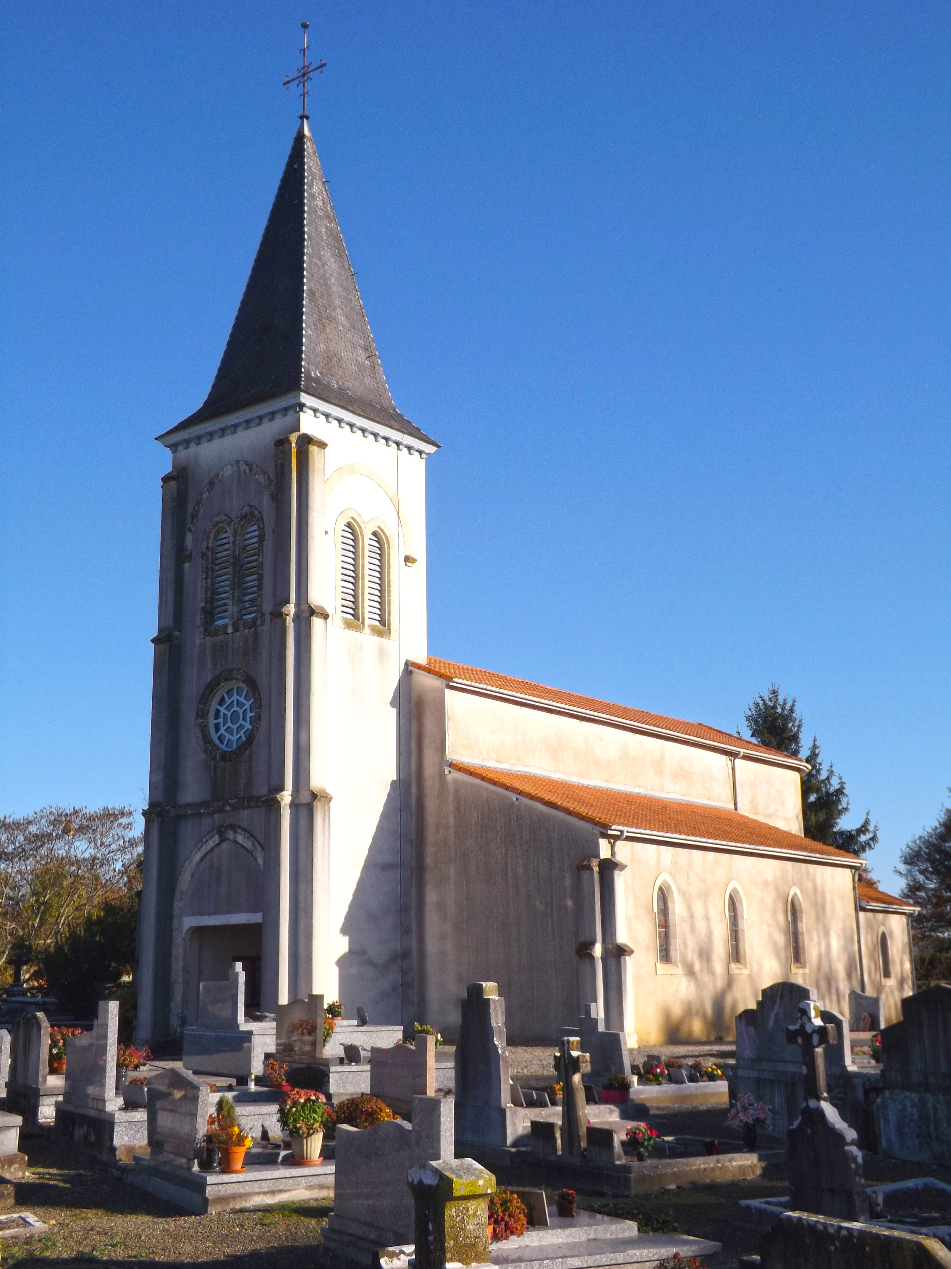 Eglise de Bonnegarde, Landes, FranceOccitan : Glèisa de Bona Guarda; Shalòssa; Gasconha